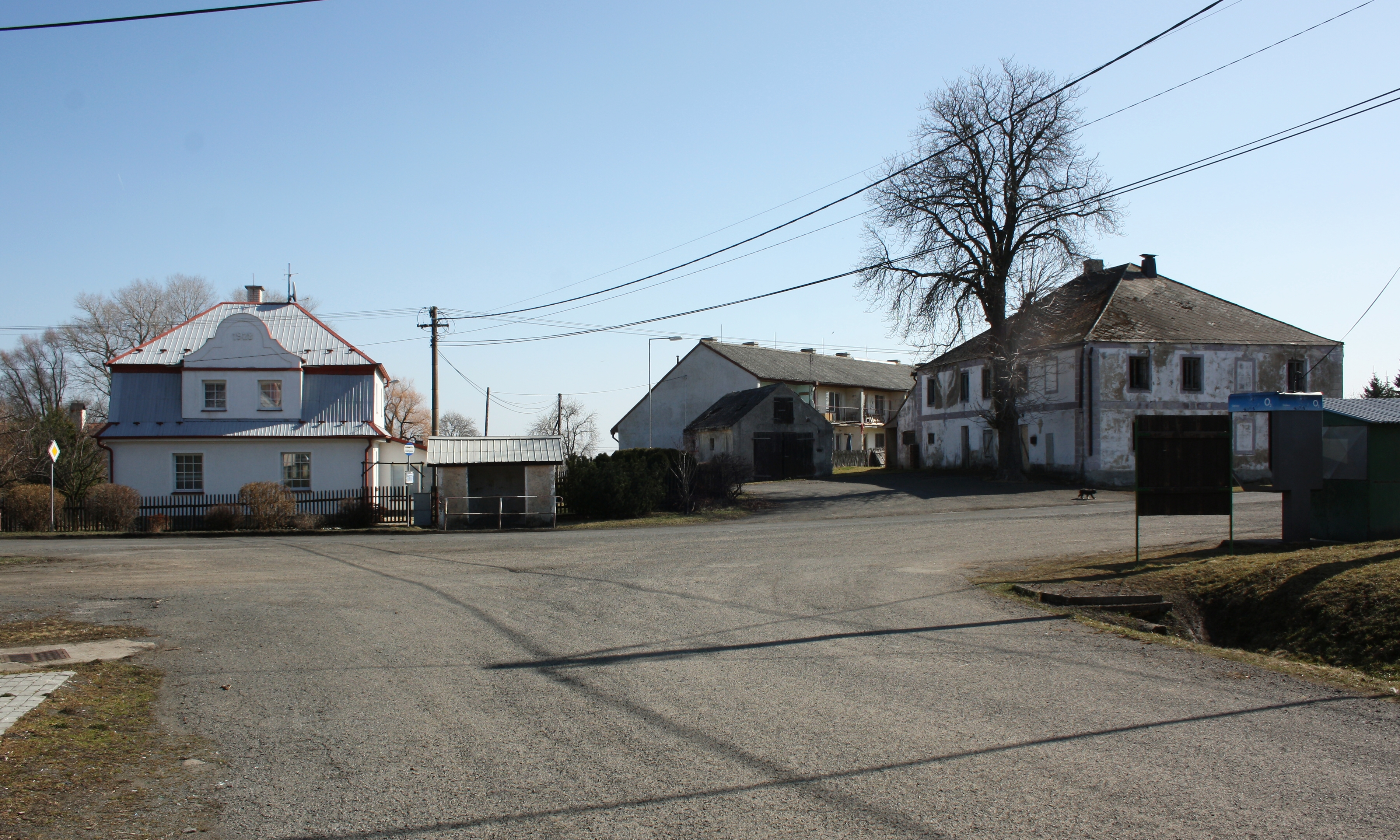 Vrbice